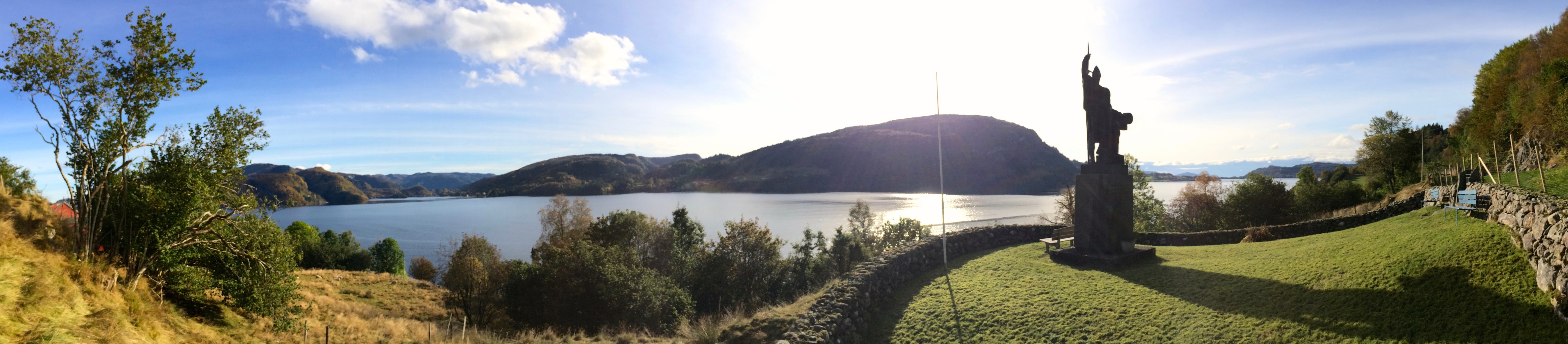 En kopi av Einarr Jonssons statue av Ingolf Arnarsson fra 1907 ble reist i 1961 i Rivedal ved Holmedal langs Fylkesveg 609 på nordsida av Dalsfjorden i Askvoll kommune i Sogn og Fjordane. Ingolf Arnarsson fra den vesle bygda Rivedal i Sunnfjord regnes som den første norrøne bosetteren på Island (se NRK om Ingolfr Arnarson). Forvridd, hakkete og sammenpresset panoramabilde 15. oktober 2015.